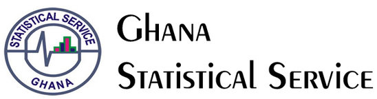 Ghana Statistical Service (GSS) logo.